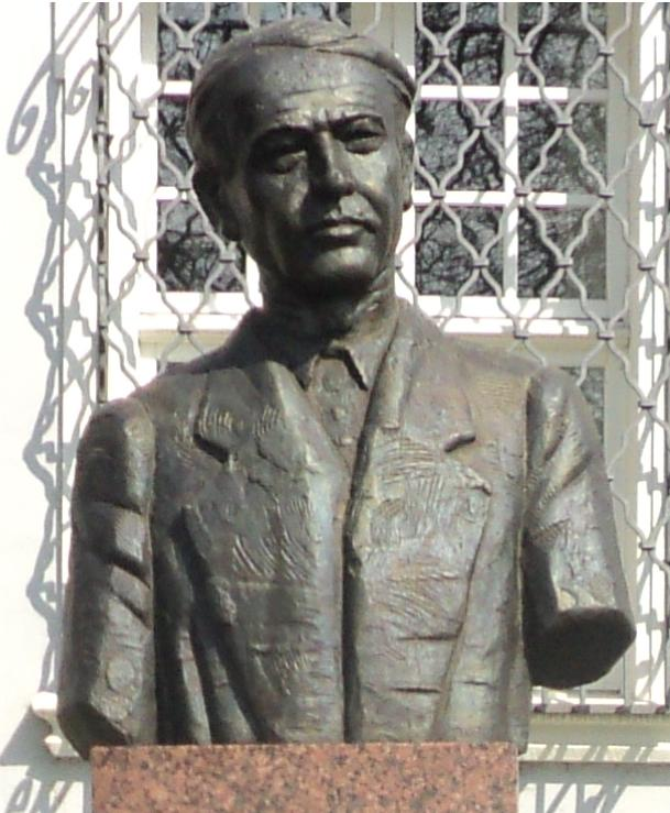 Skuptura slikara Ivana Domca u Slavonskom Brodu ispred Franjevačkog Samostana